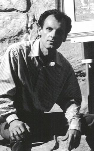 Fotografie z výstavy v Berlině